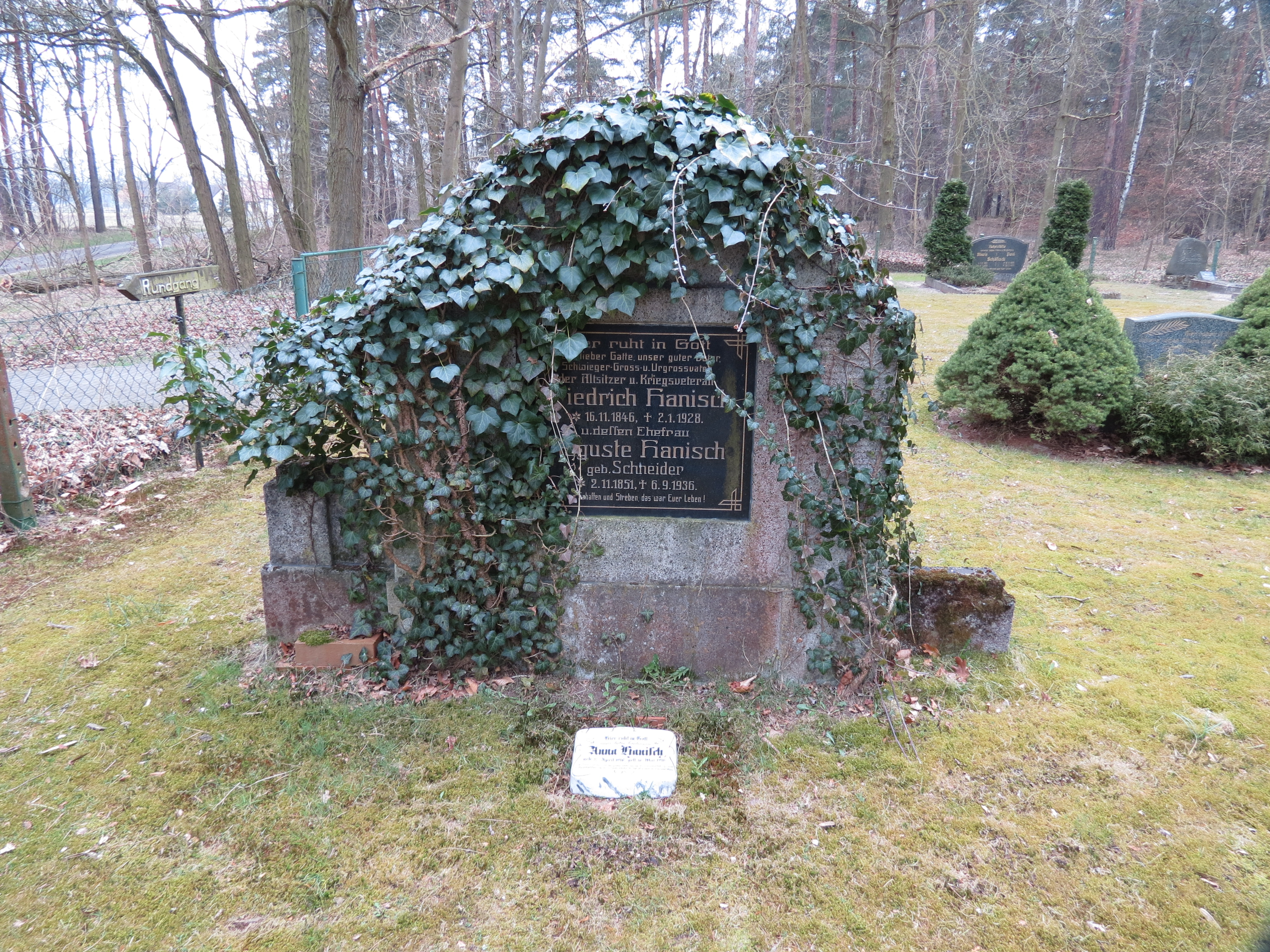 Waldfriedhof, Historisches Gräberfeld, Plattkow, Ortsteil der Gemeinde Märkische Heide, Landkreis Dahme-Spreewald, Brandenburg, Deutschland